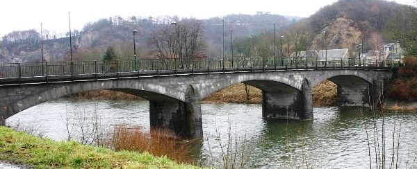 Bréck vu Comblain-la-Tour.